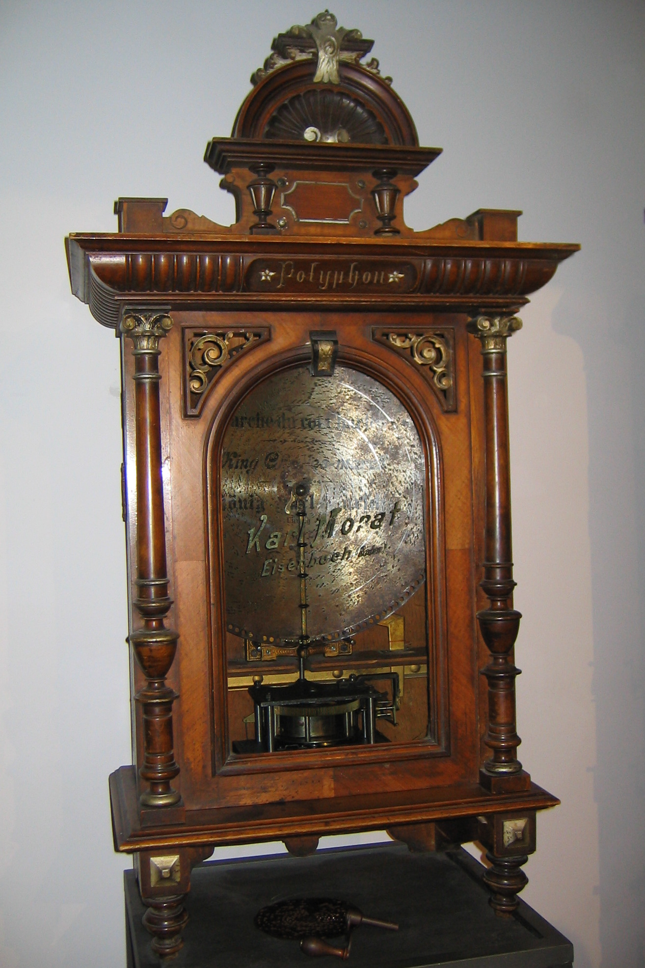 Polyphon von Karl Morat aus Eisenbach